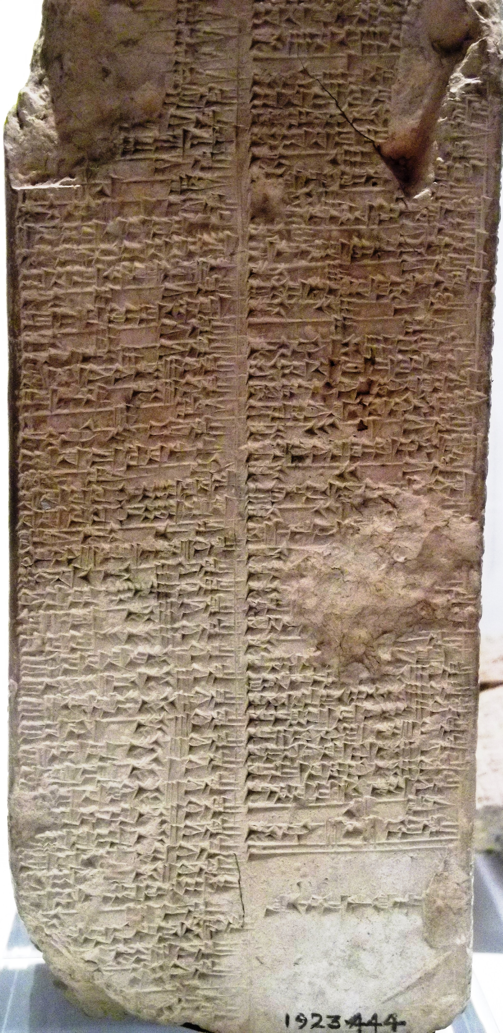 Sumerische Königsliste, Larsa/Tell Senkereh (Irak) ca. 1740 v. Chr., aus Ton, Museum Oxford, InvNr 1923.444